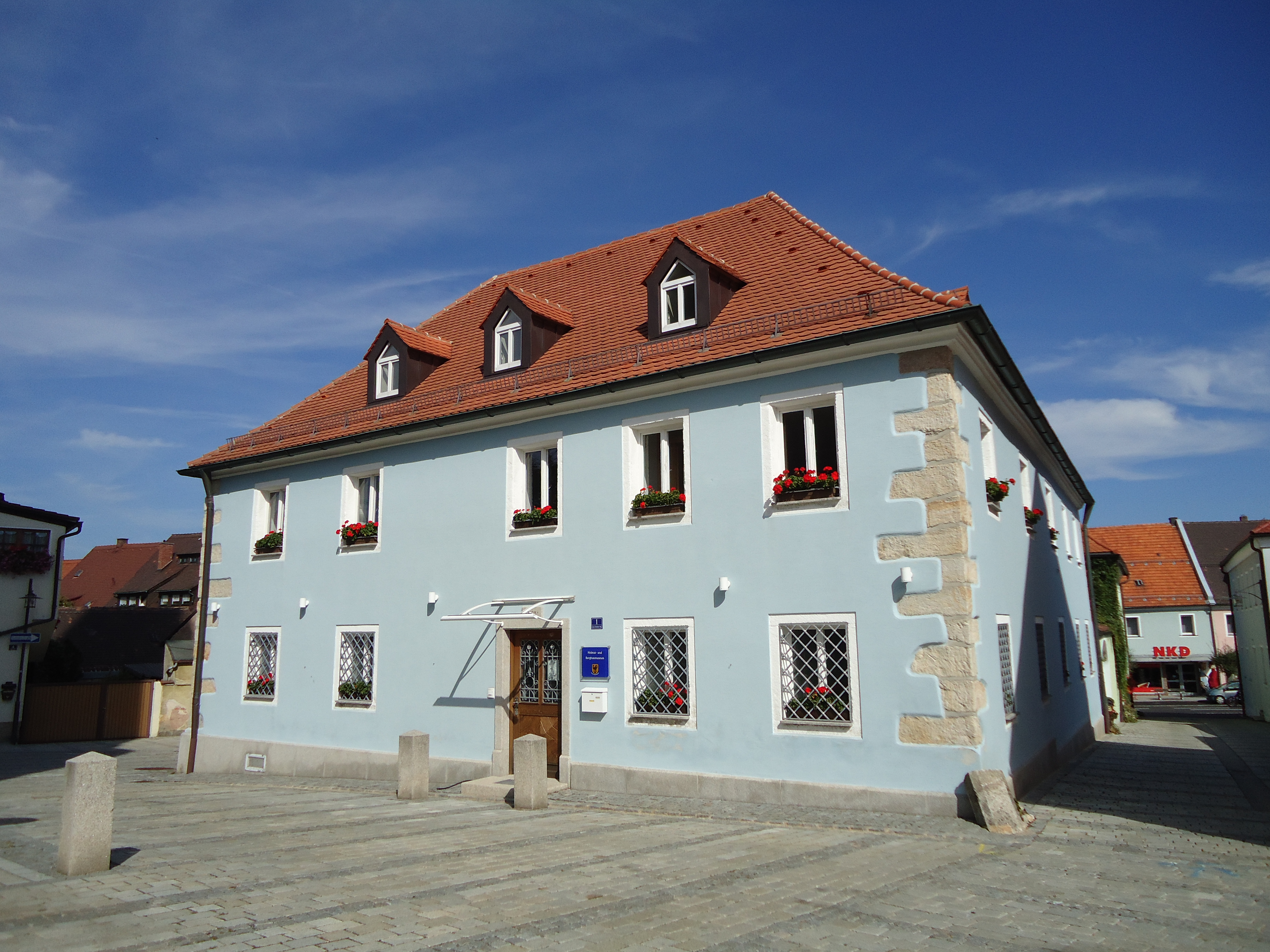 Bergbau- und Heimatmuseum Erbendorf